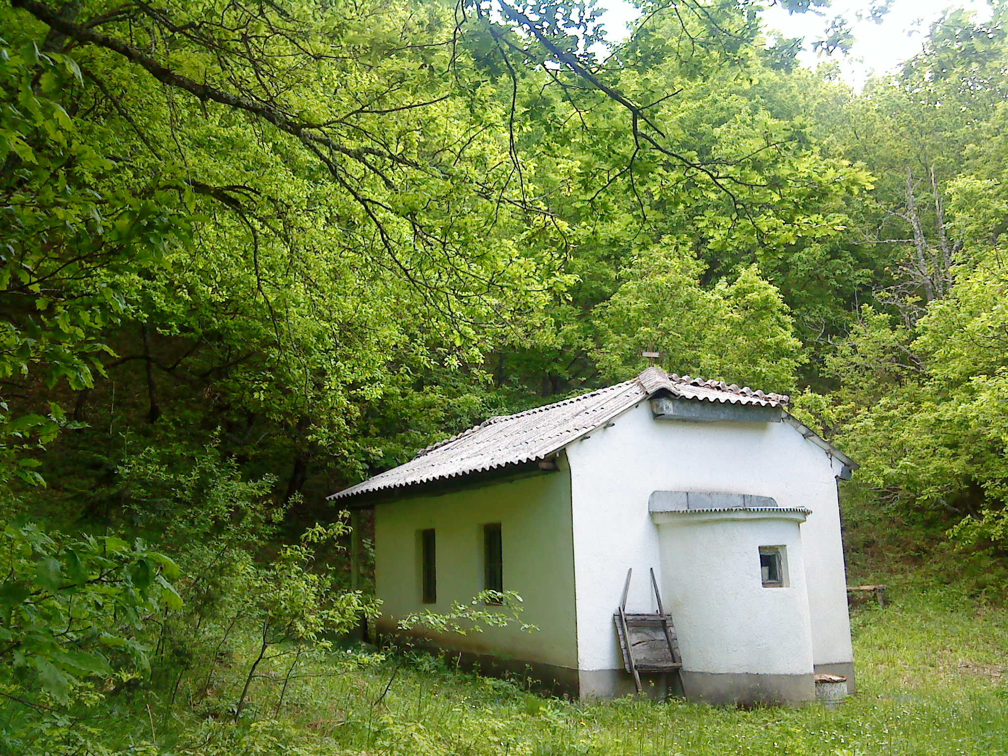 Црква св.Богородица с.Ѓавато м.в.Главиште